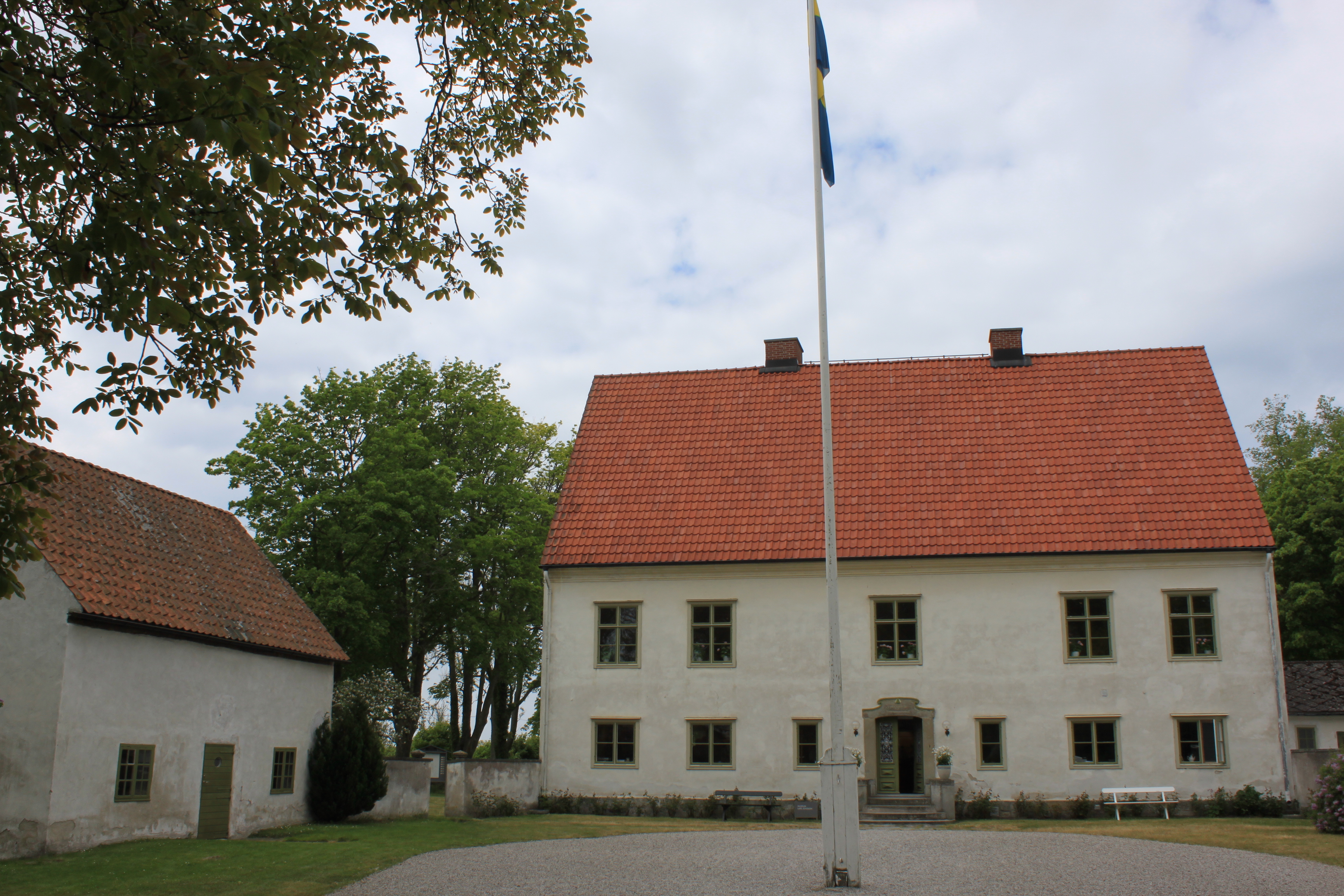 Vamlingbos prästgård (Vamlingbo Prästgården 1:6; f.d. 1:1). Gotlands län.